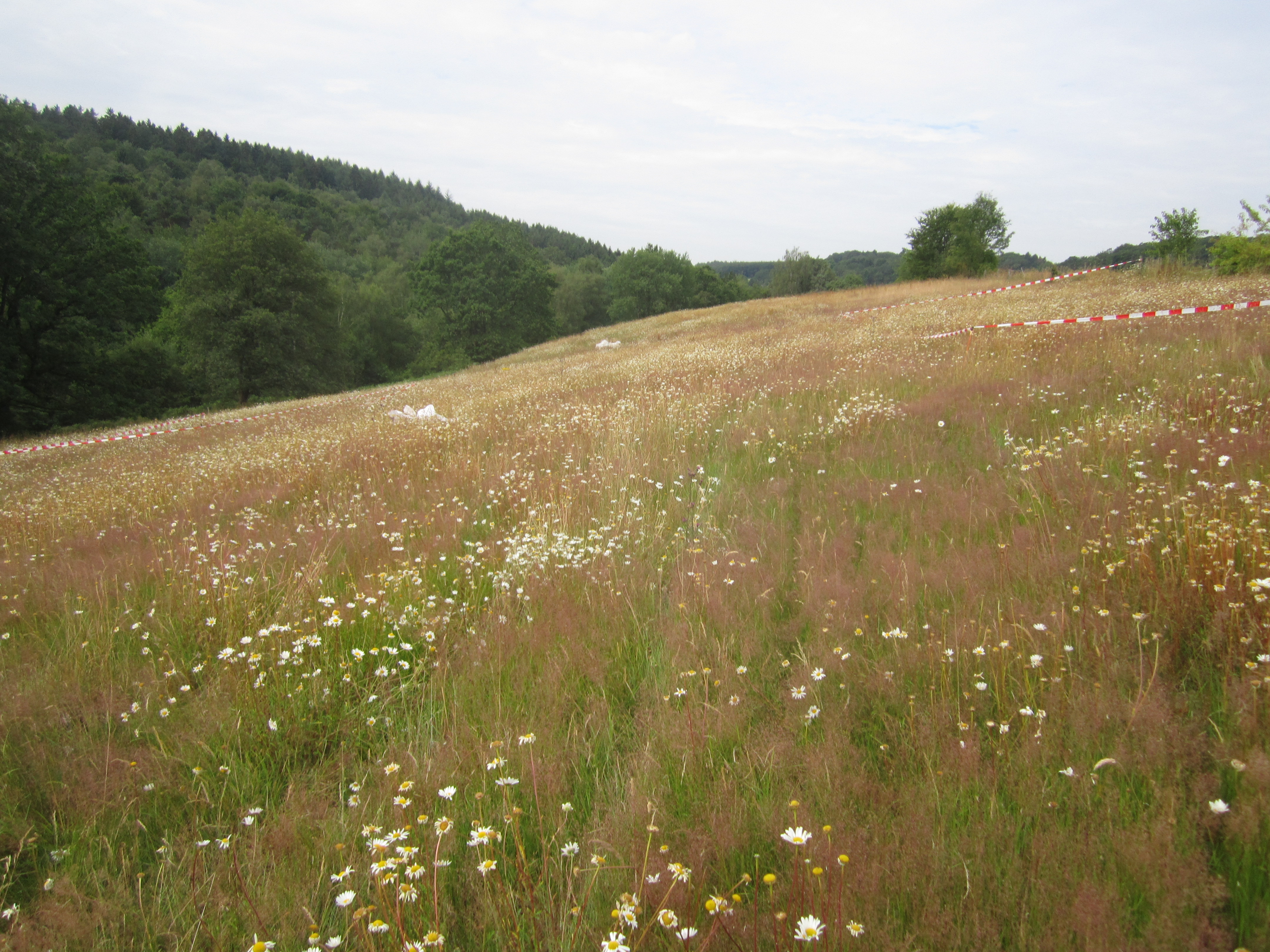 Wiese mit Margeriten nördlich des Feldbaches nahe des Weilers Niederfeldbach im NSG Feldbachtal.